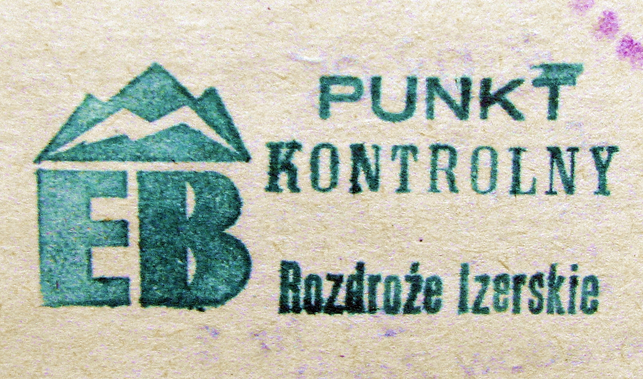 Pieczątka punktu kontrolnego szlaku Eisenach - Budapeszt z 1986 r.